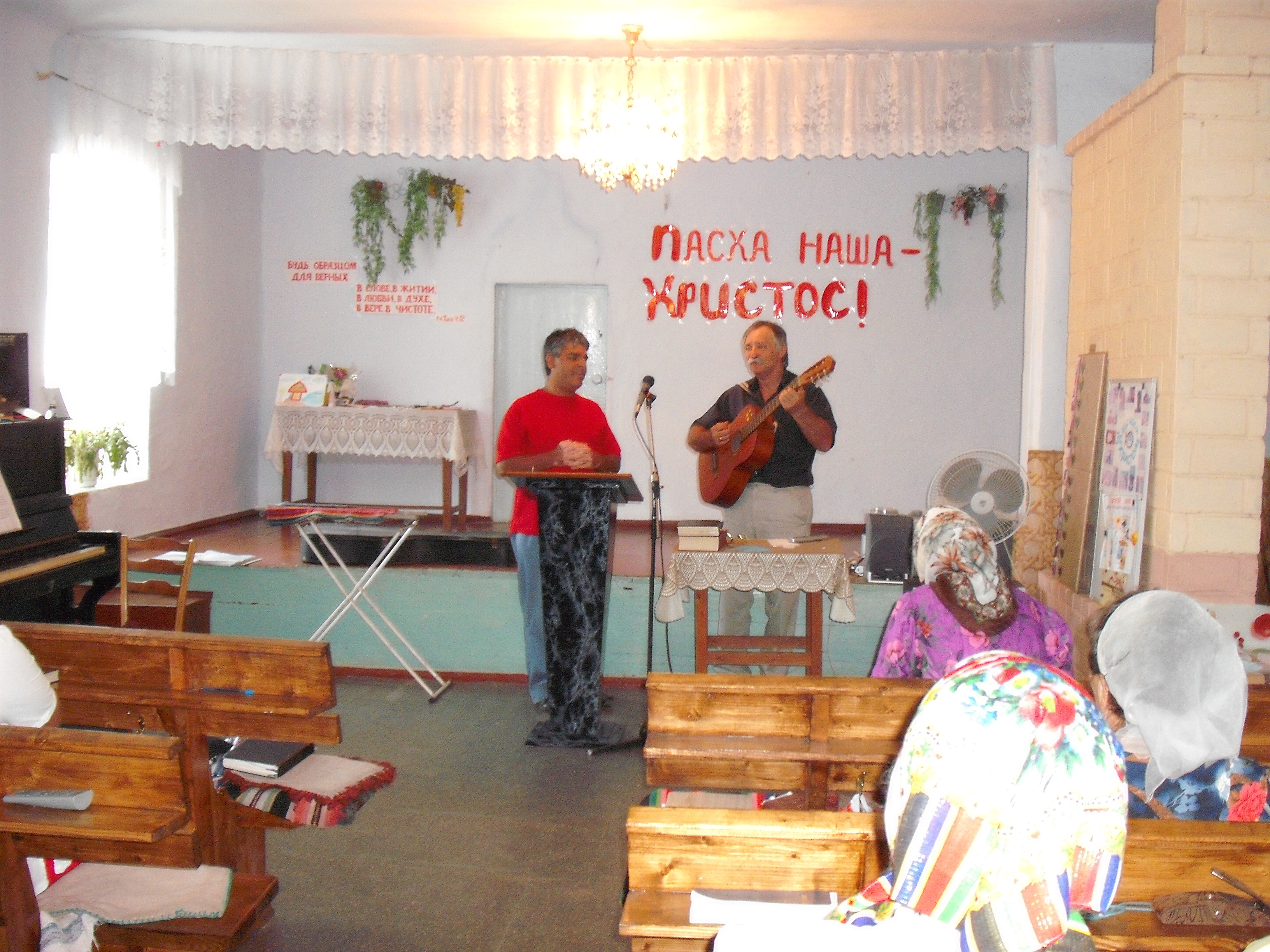 Церква євенгельських християн баптистів у Косовці, Білгород-Дністровський район Одеської області: Іранський пастор Алі співає разом зі своїм другом - євреєм. Тільки Христос може об'єднати колишніх ворогів.